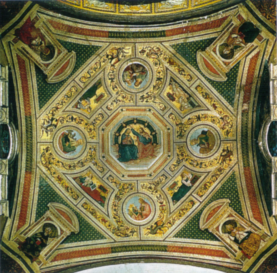 Pinturicchio, volta del coro di santa maria del popolo, incoronazione della vergine, evangelisti, sibille e dettori della chiesa, 1509-1510